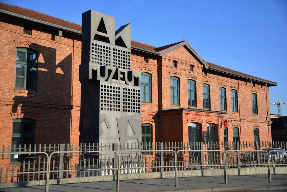 Siedziba Muzeum AK po remoncie